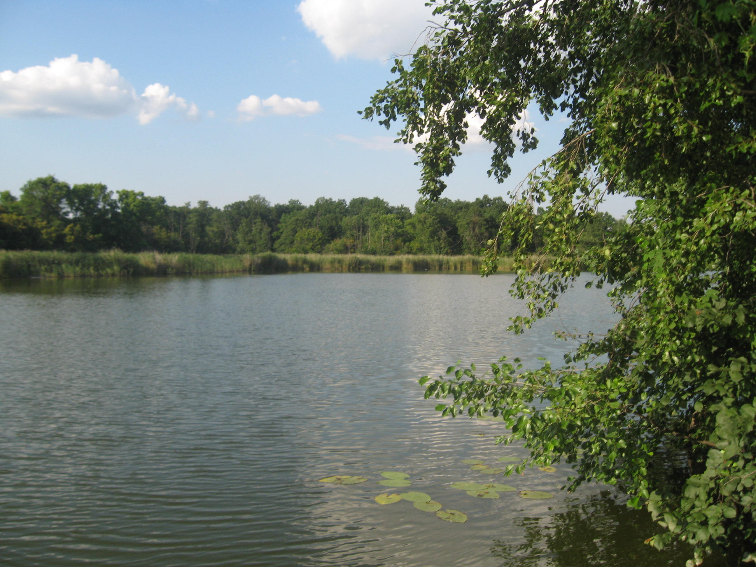 Видна река.